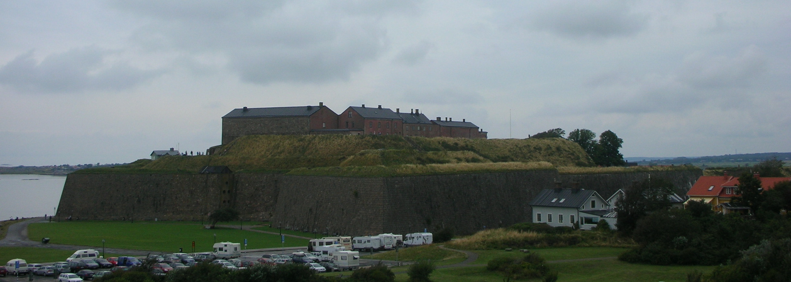 Varbergs fästning sedd från Rantzauklippan.